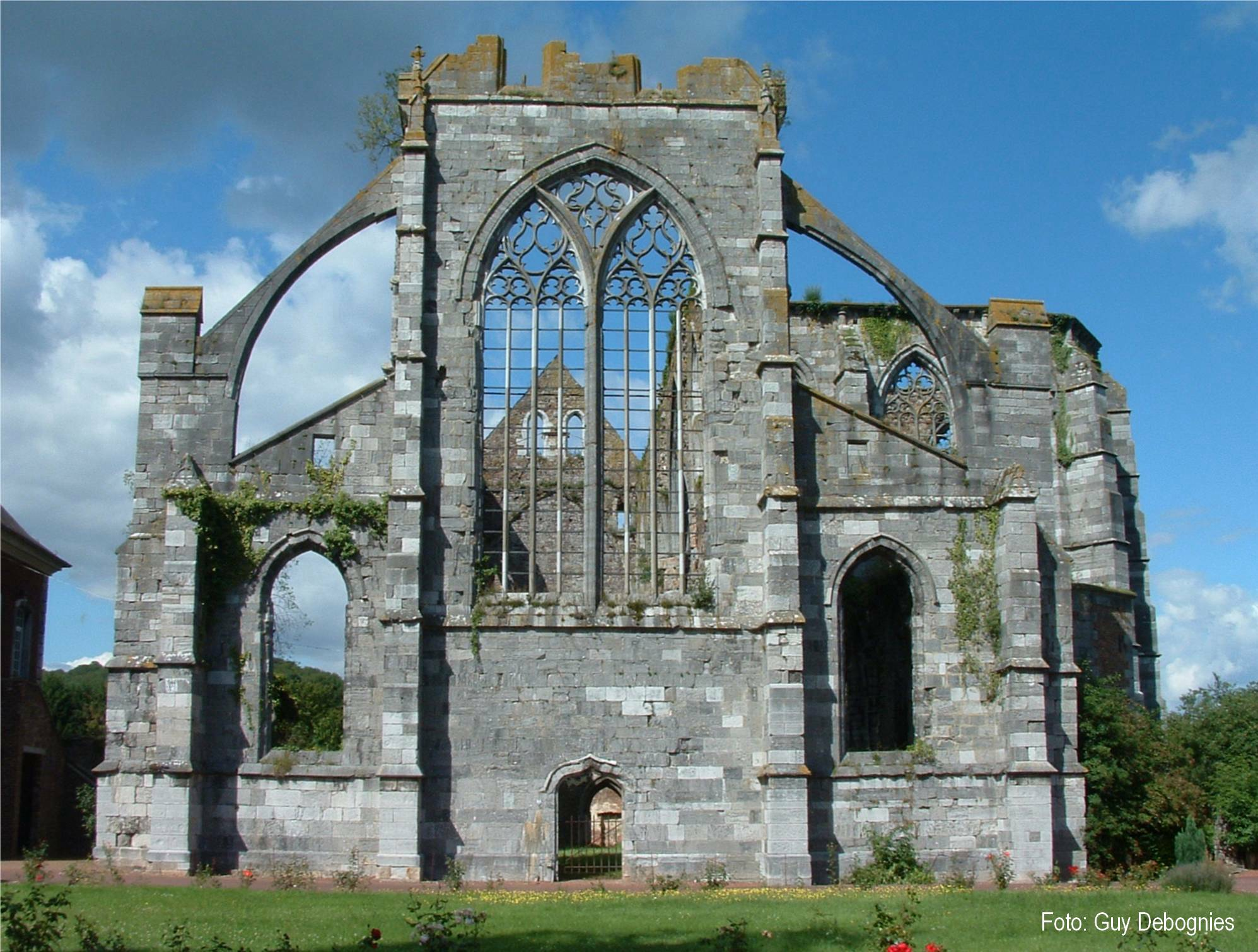 07 aug. '05